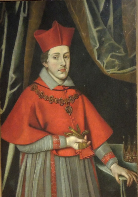 Ritratto di Ferdinando Gonzaga (1587-1626)